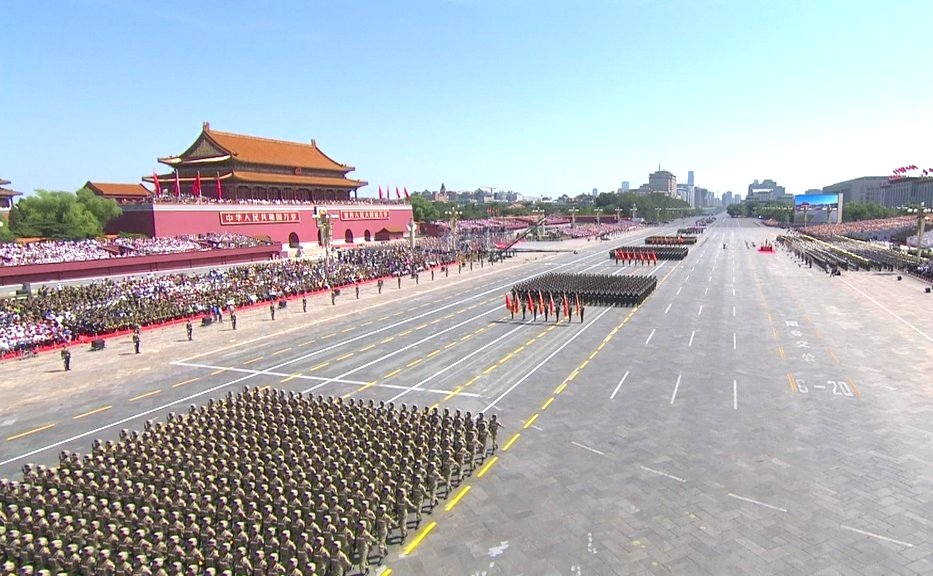 Военный парад в честь 70-й годовщины Победы китайского народа в войне сопротивления Японии и окончания Второй мировой войны